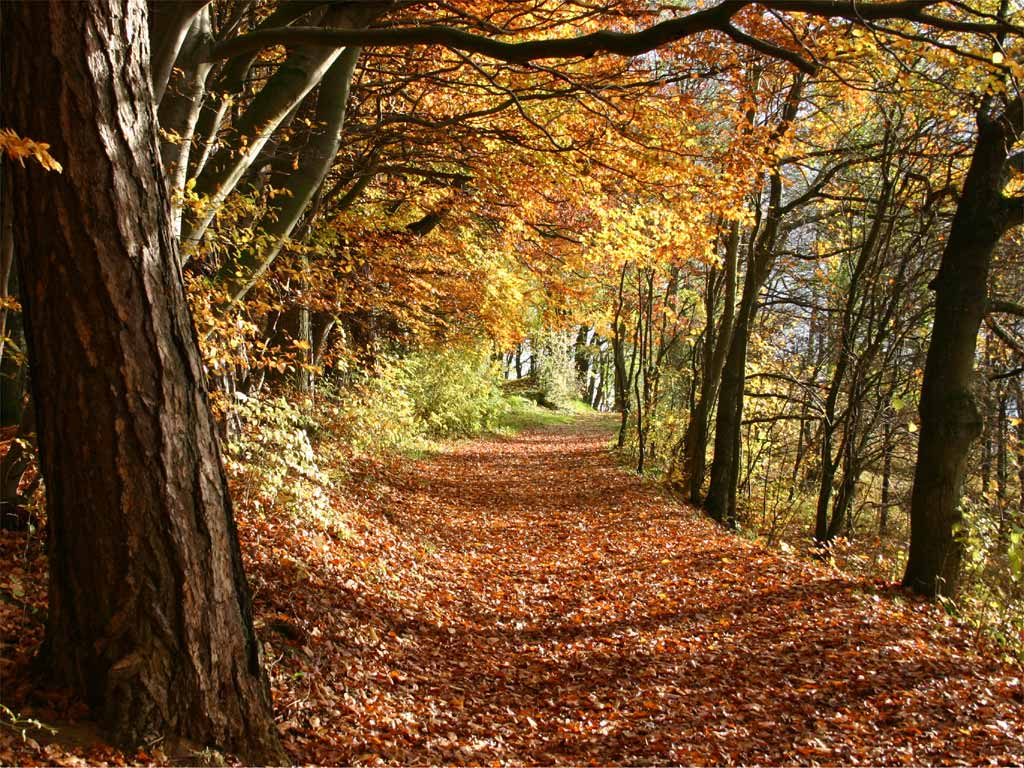 Herbstwald in Deutschland